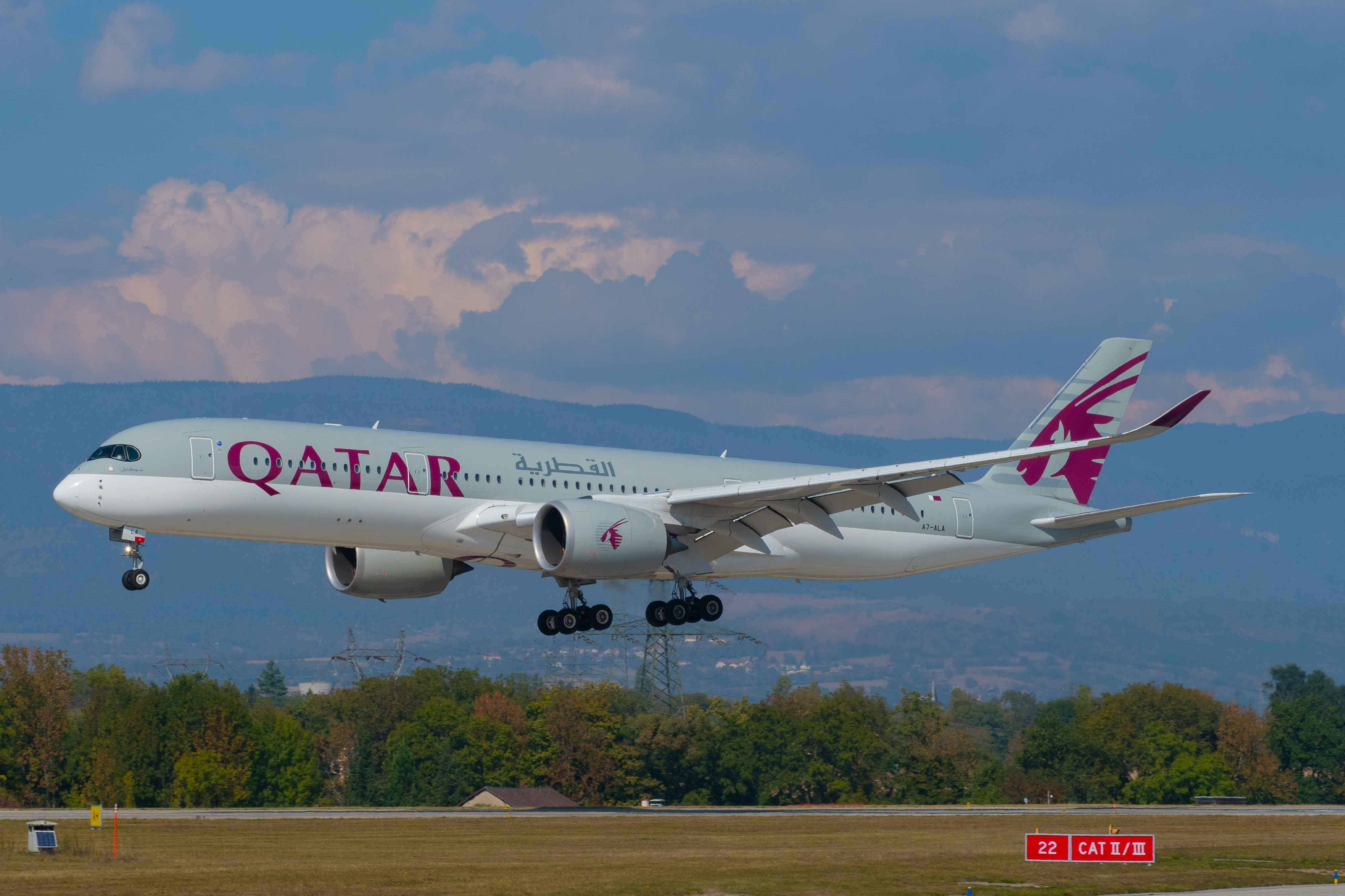 Geneva International Airport